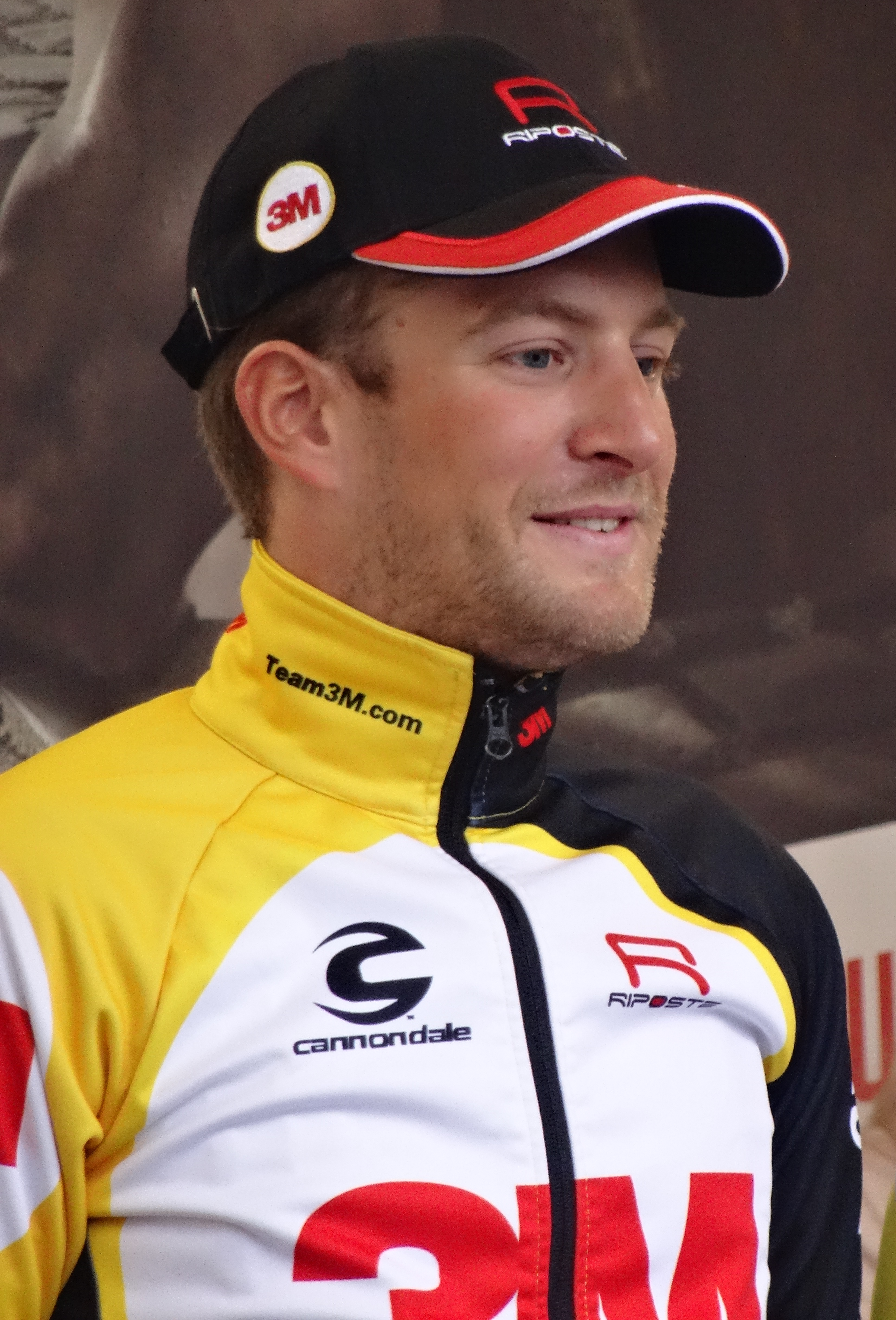 Reportage réalisé le dimanche 1er mars à l'occasion du départ et de l'arrivée de Kuurne-Bruxelles-Kuurne 2015 à Kuurne, Belgique.